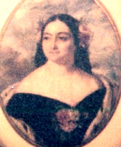 Madame Charles Baud, née Mélanie Rodrigues Henriques (1809-1874)